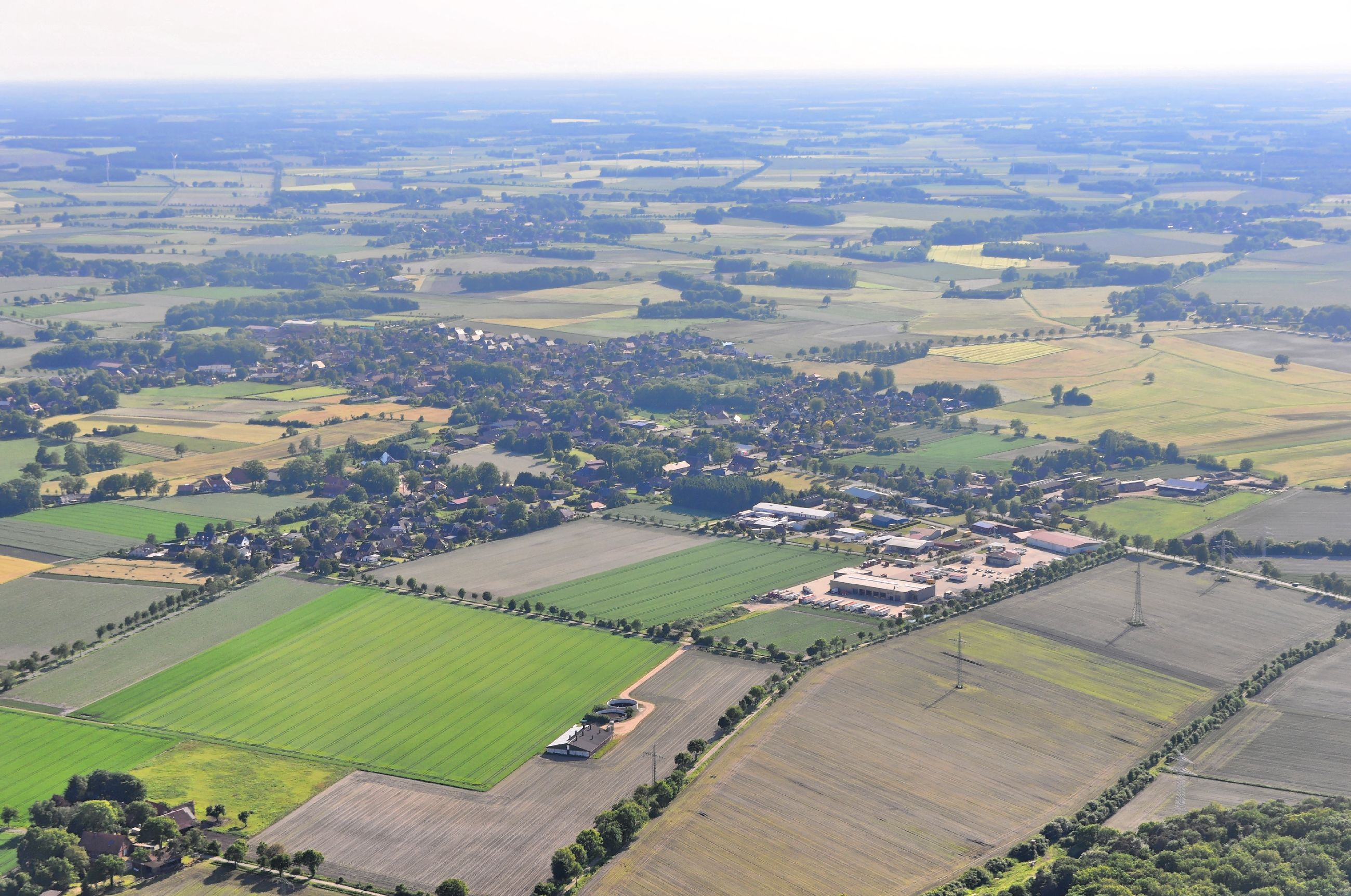 Überführungsflug vom Flugplatz Nordholz-Spieka über Lüneburg, Potsdam zum Flugplatz Schwarzheide-Schipkau